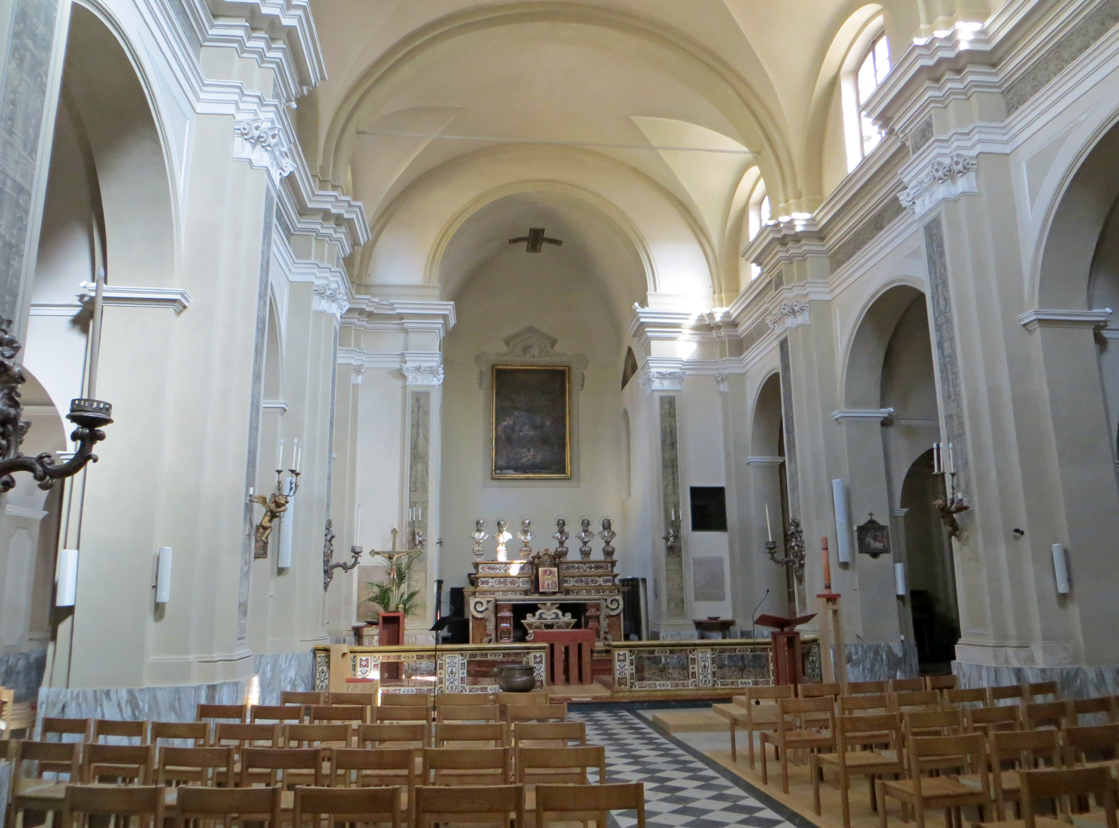 Chiesa della Santissima Trinità (Parma) - navate